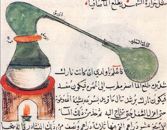 Image of Alembic , Invented by Jabir Ibn Hayyan